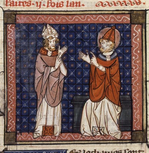 Saint Mamertinus (Saint Mamert) and Saint Gregory I. Jacobus de Voragine, Legenda aurea (traduction de Jean de Vignay).